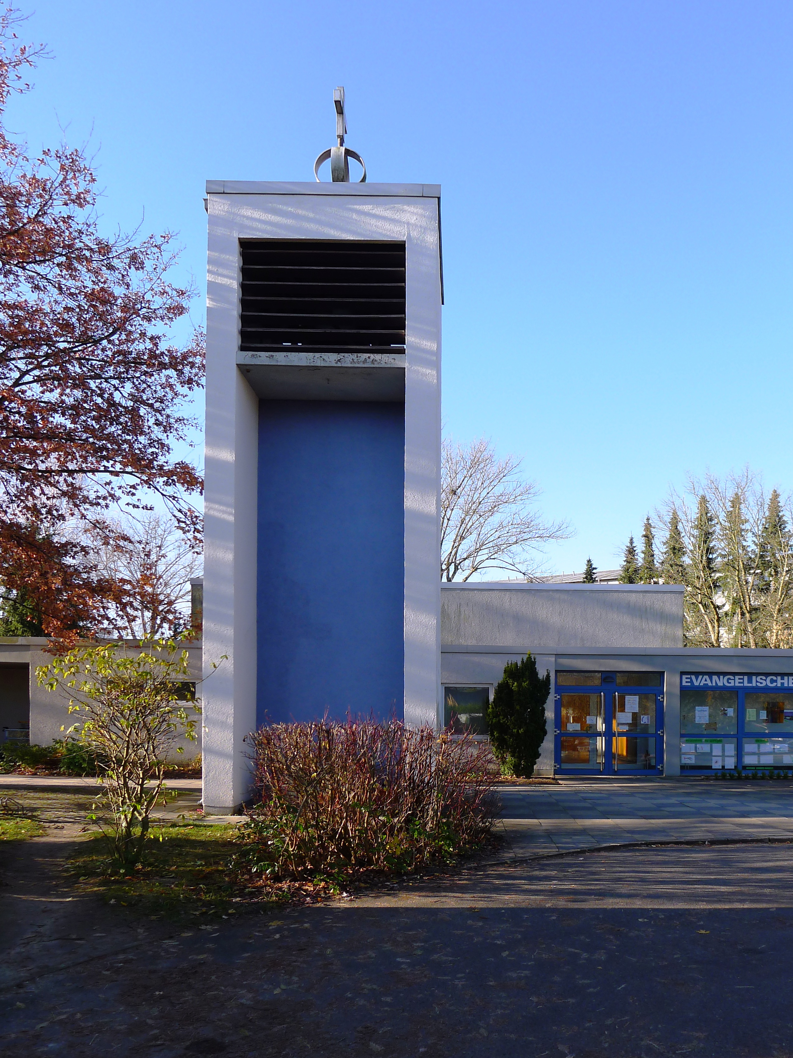 Der Campanile steht weit vor den Gebäudetrakten